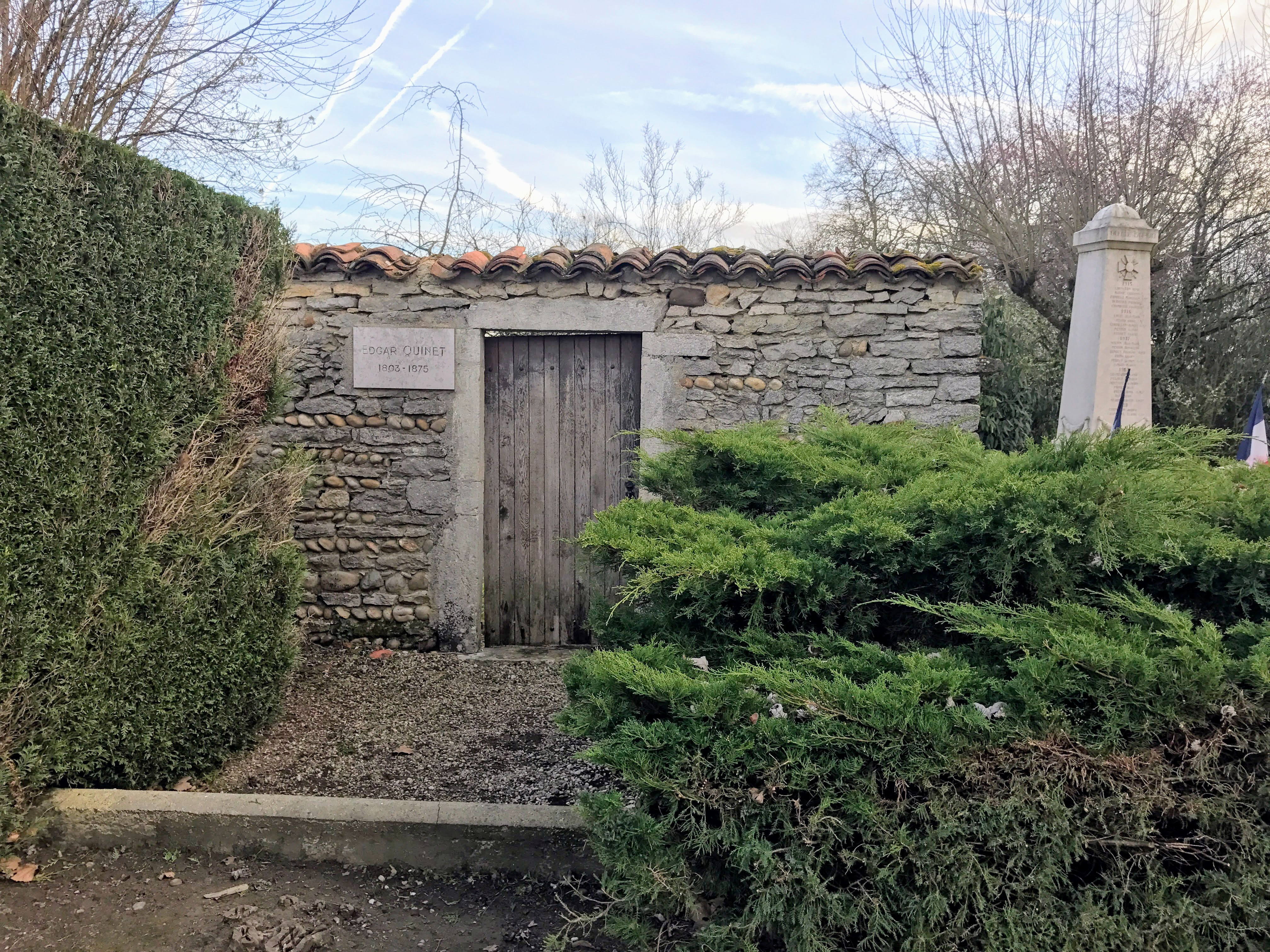 Vestiges de la maison d'Edgar Quinet à Certines (Ain)